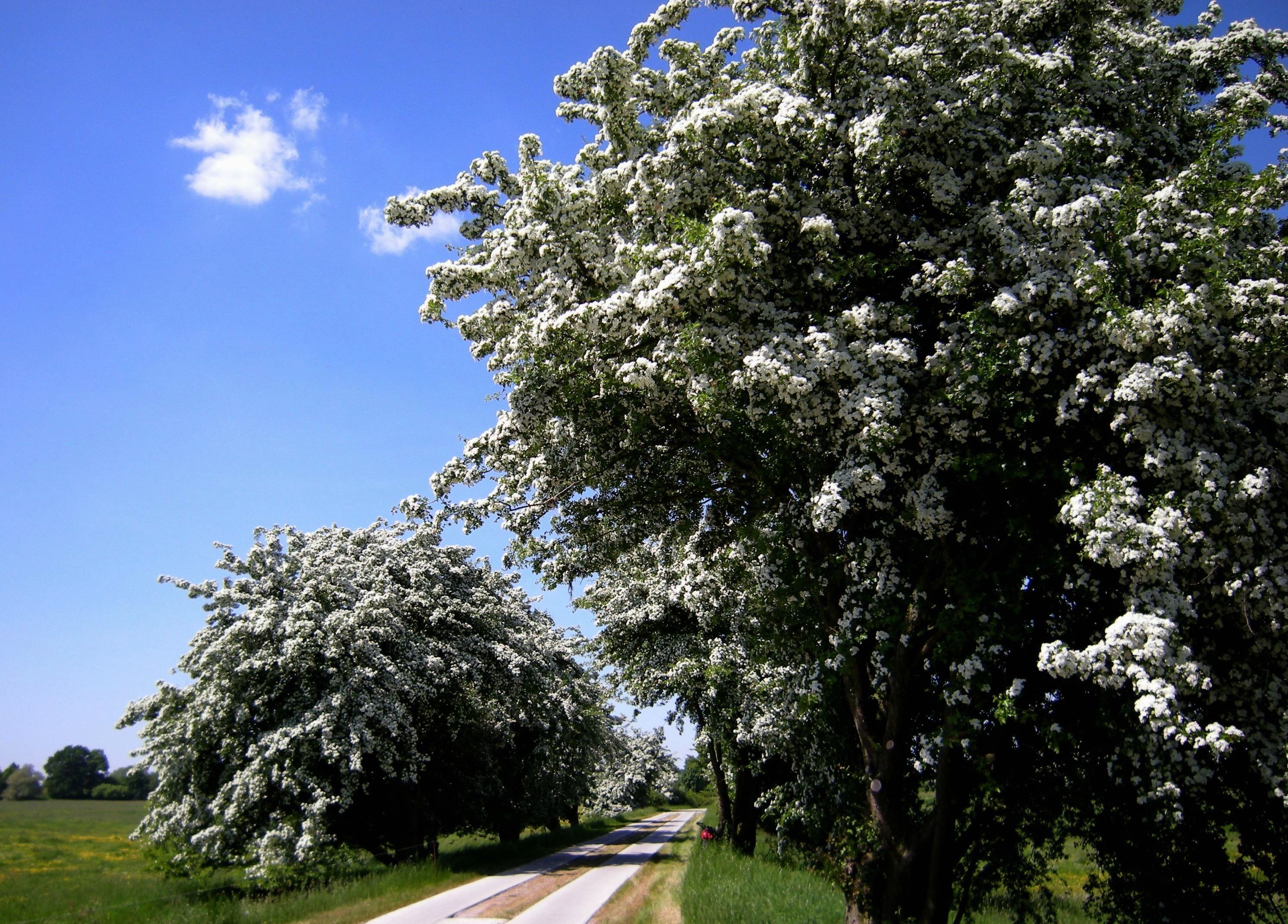 Havelberg - Radweg von blühendem Weißdorn umgeben.